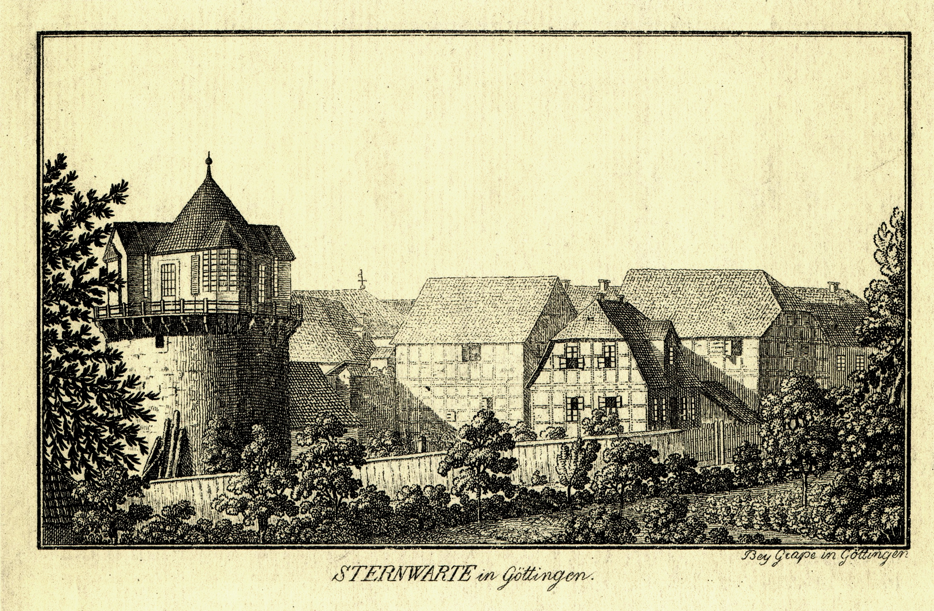 Erste Sternwarte Göttingens auf einem ehemaligen Turm der Stadtbefestigung (links) und Fachwerk-Bebauung an der Turmstraße. Stammbuchblatt 8,1x 13,8 cm, nach einer Radierung von Heinrich Christoph Grape. Signiert: "Bey Grape in Göttingen".